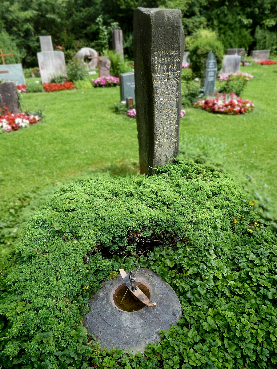 Armin Schibler (1920–1986) Komponist, Musikpädagoge, Grab auf dem Friedhof Witikon, Zürich Inschrift: Wenn das Tönende die Spur der Wahrheit ist- Unberedbare Sprache wortlose Botschaft- Dann bist Du am Ort- Lausche sei gefasst bis an die Ränder des Schmerzes